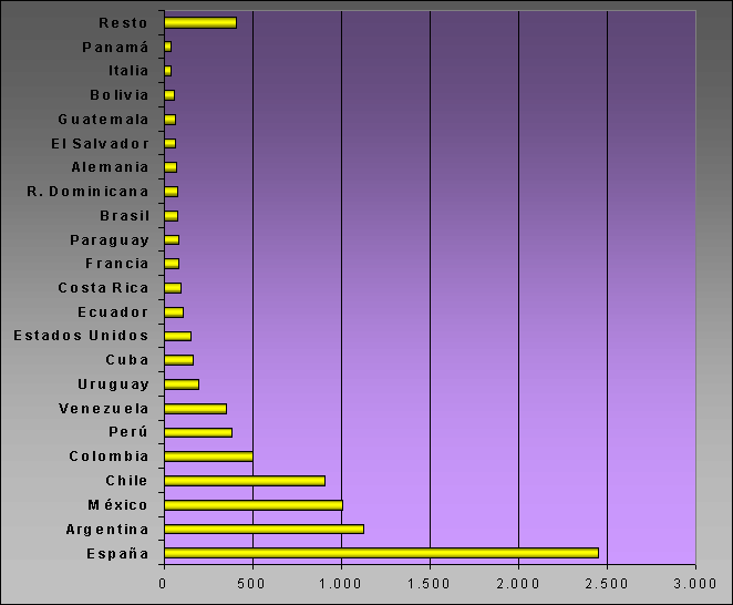 Wikipedia en español. Gráfico de Wikipedistas registrados por país (más de 50). Datos tomados de [1] el 4 de junio de 2009. Wikipedians by country in the Spanish Wikipedia. Figures taken from Category:Wikipedians by country, at 4 jun 2009. TOTAL DE WIKIPEDISTAS REGISTRADOS POR PAÍS: 5845